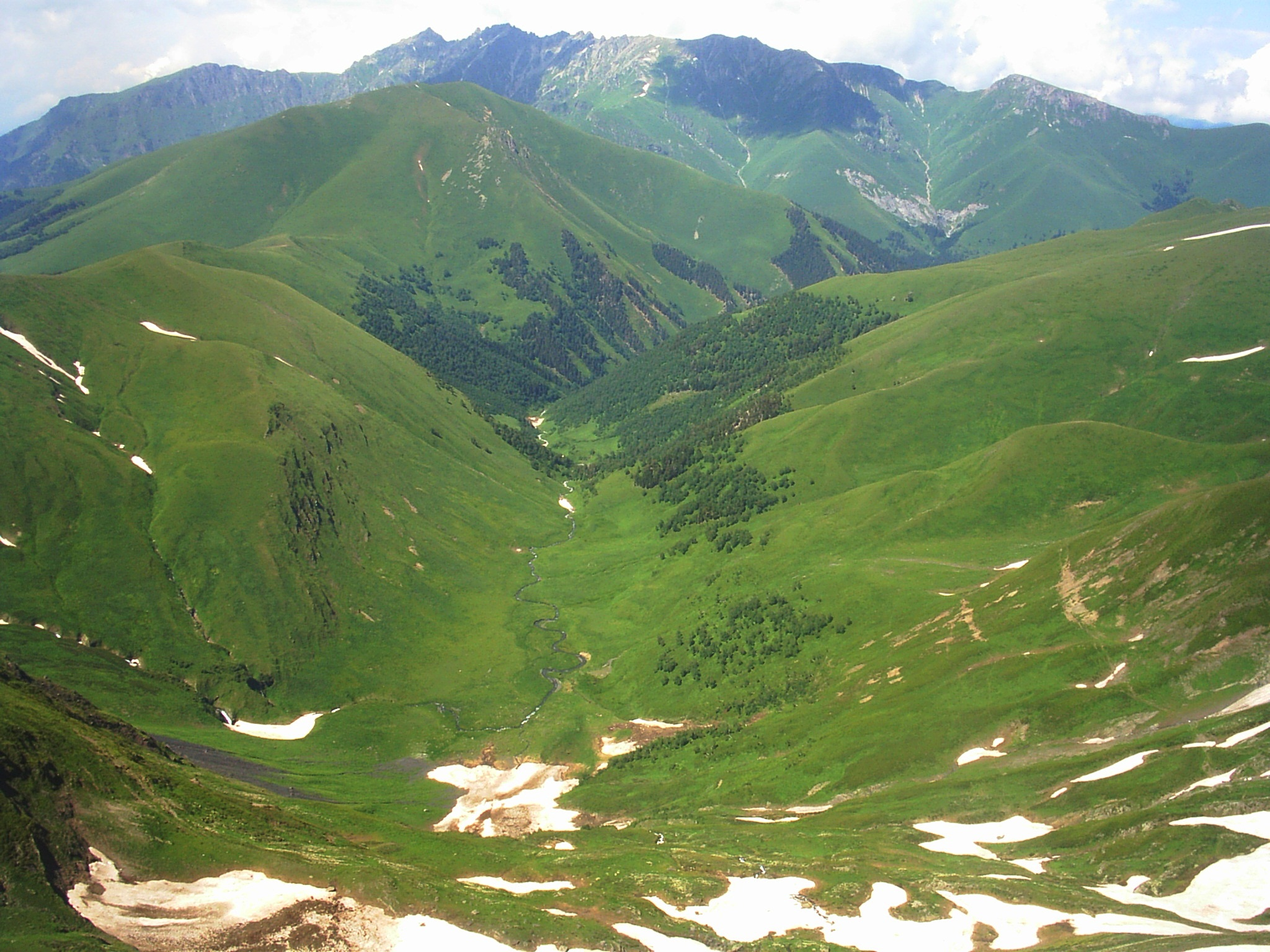 Долина реки Аспидной . На заднем плане горный массив Джуга. Кавказский государственный природный биосферный заповедник. This image is related to the protected area of Russia number 2300002